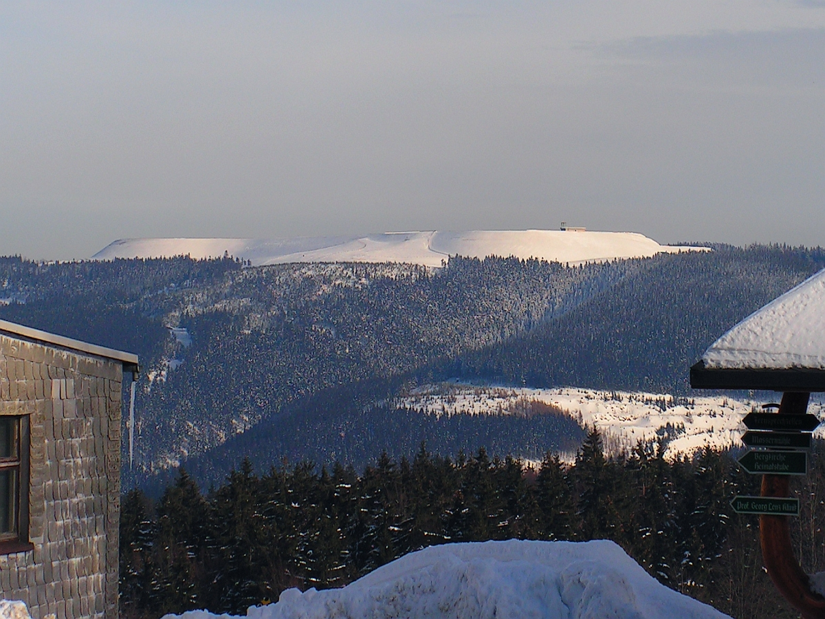 Ausblick im Winter von Masserberg in Thüringen auf das Oberbecken vom Pumpspeicherkraftwerk Goldisthal, Betreiber ist die Vattenfall Europe AG - Foto 2005 Wolfgang Pehlemann Wiesbaden V0000305